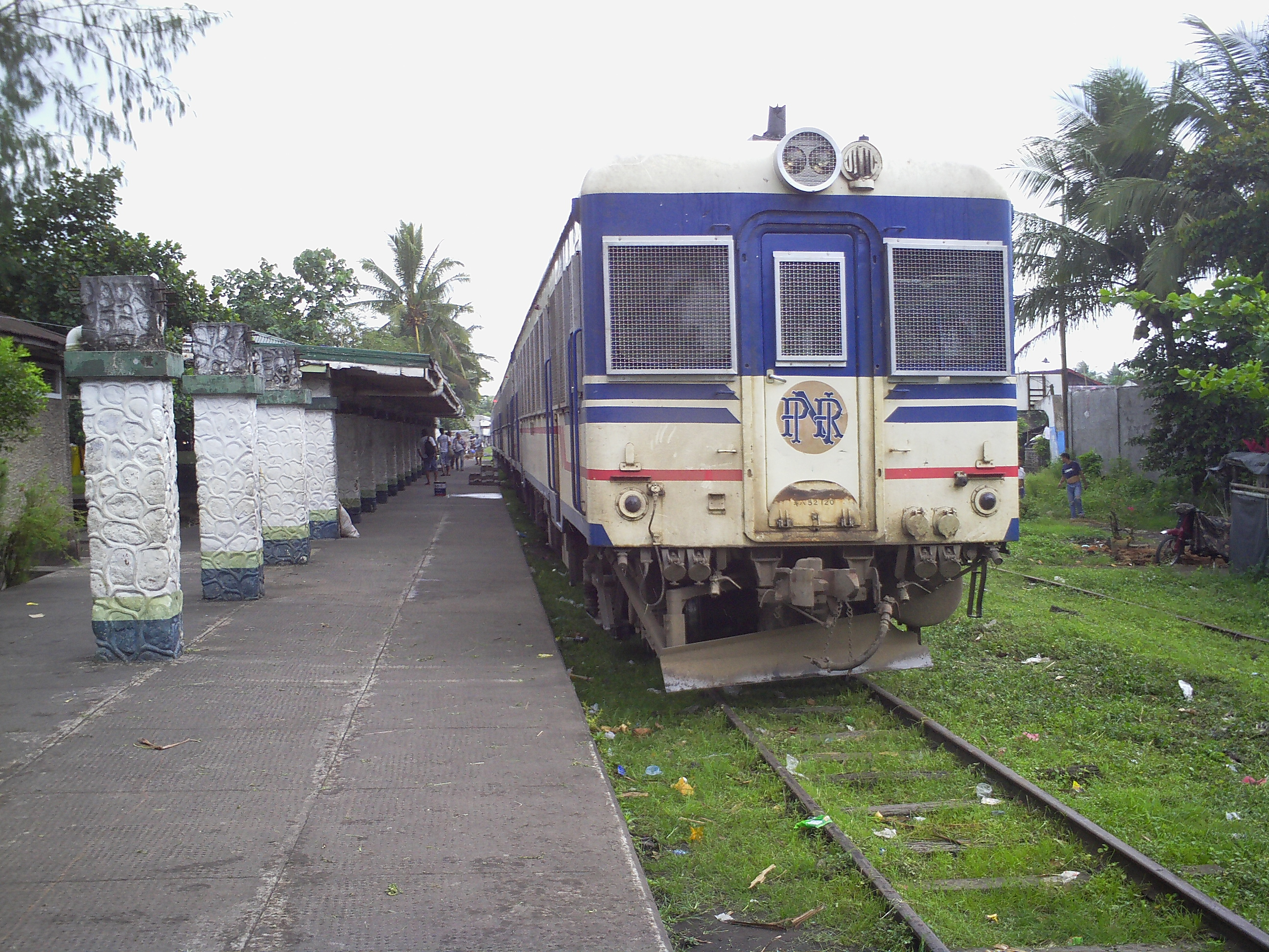 PNR Ligao Station